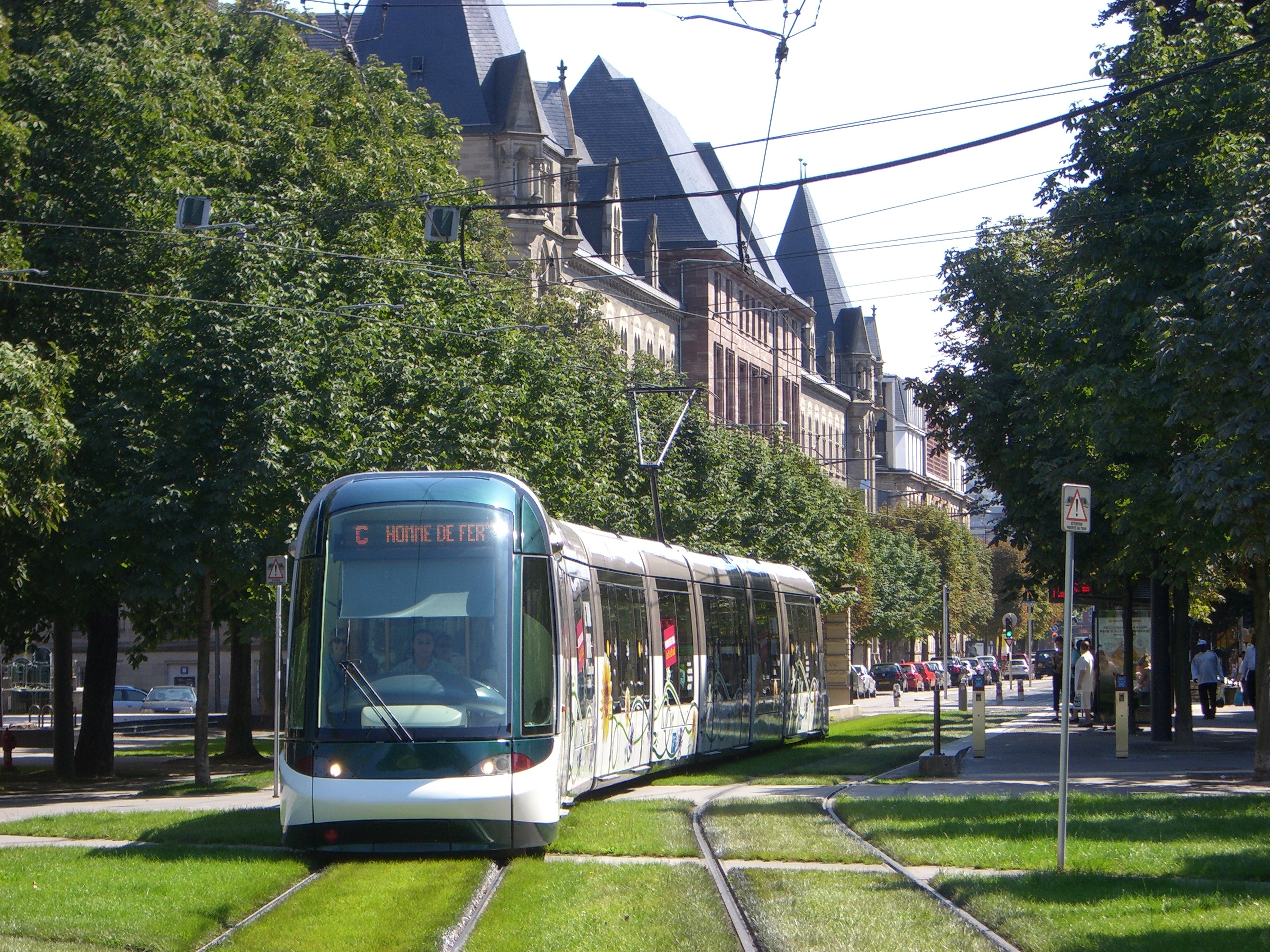 Strasbourg - Straßenbahn - Rasengleisabschnitt.jpg